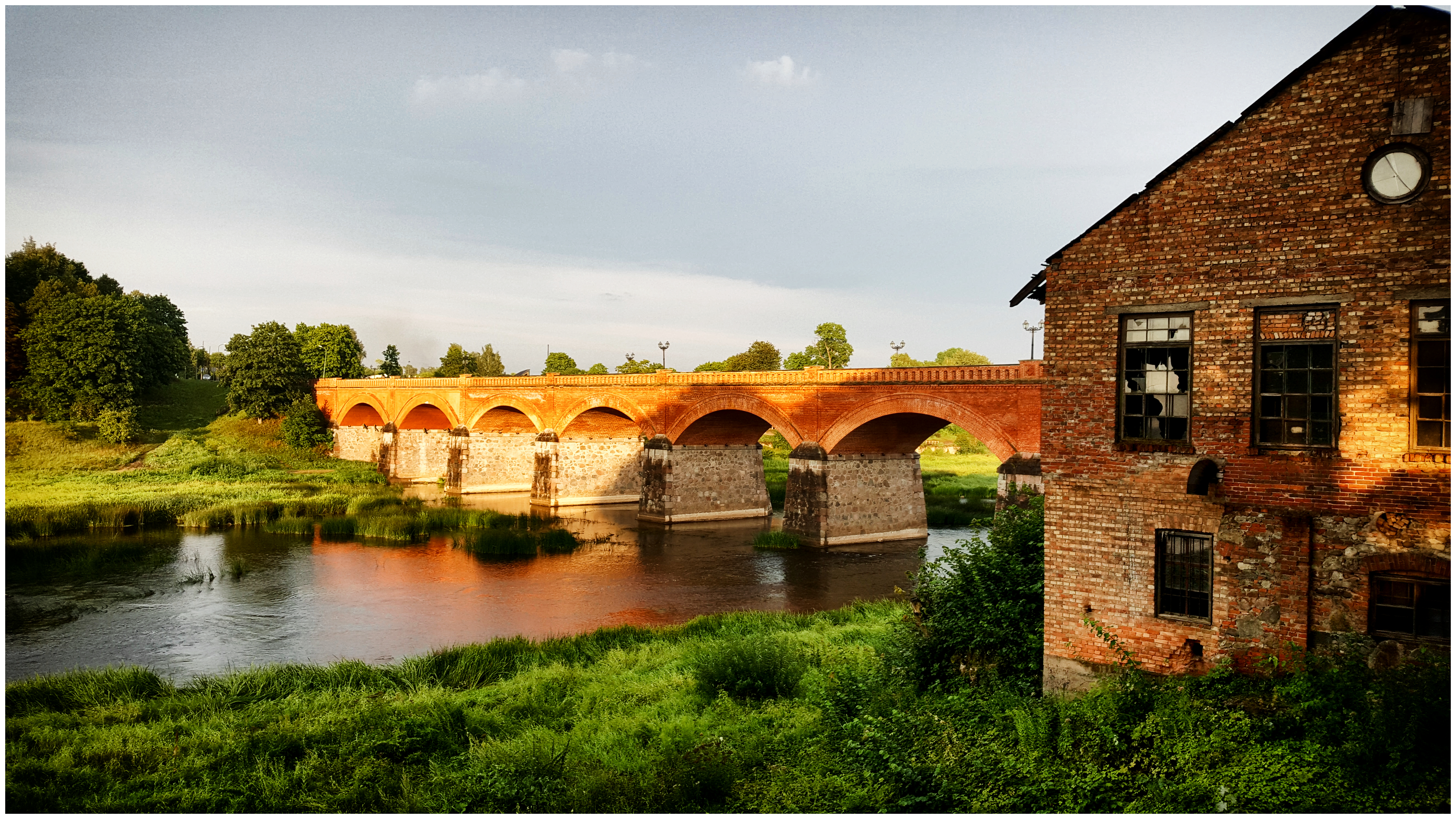 Vaade Kuldiga sillale